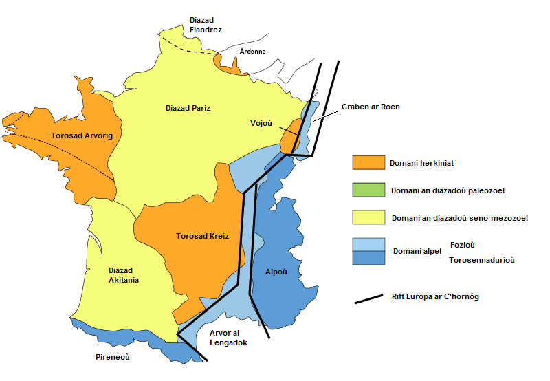 Kartenn